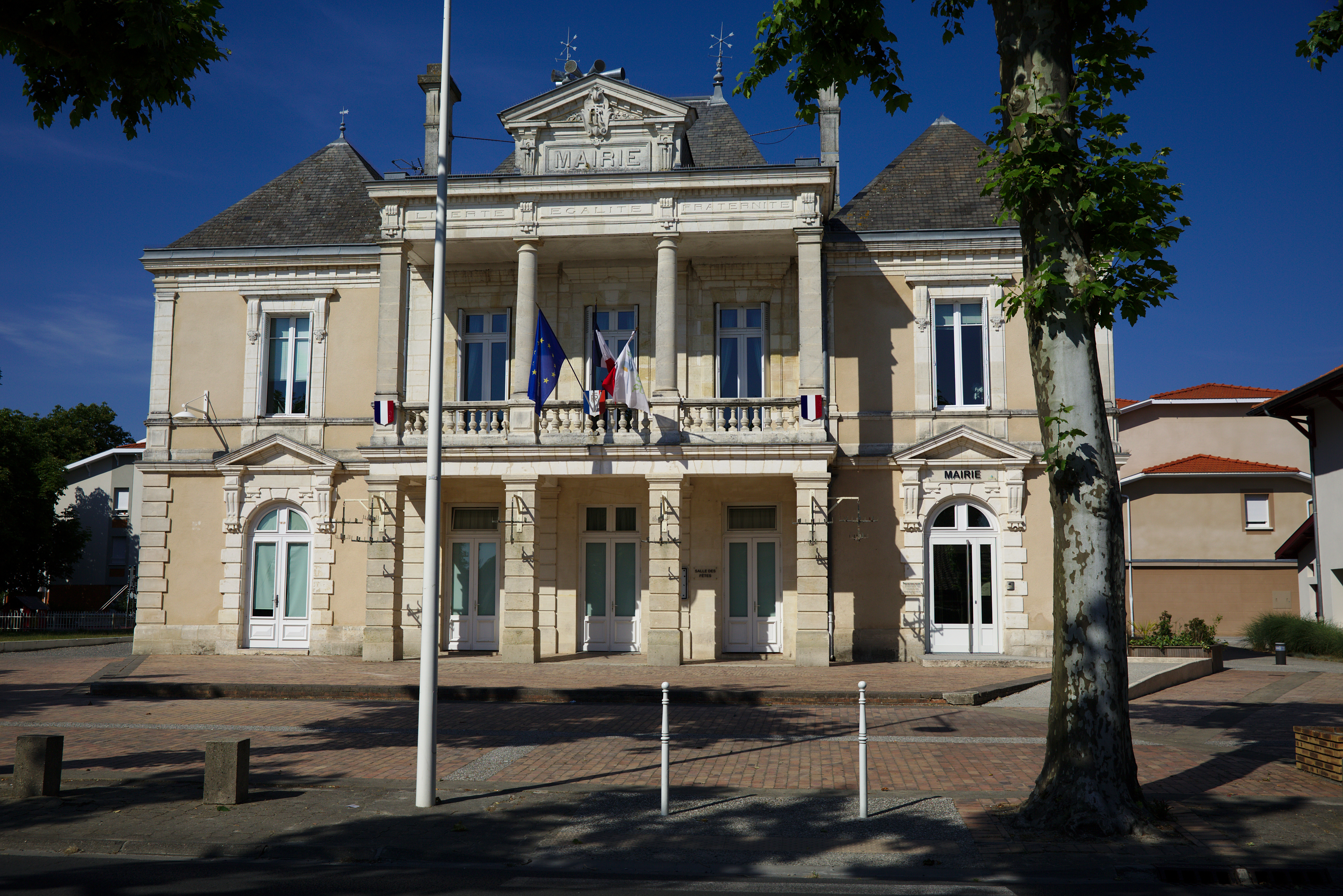 Mairie